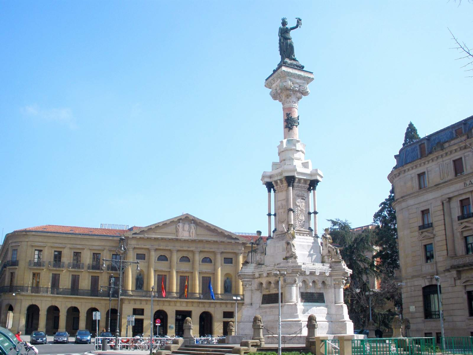 Monumento a los Fueros y Palacio de Navarra (Pamplona)